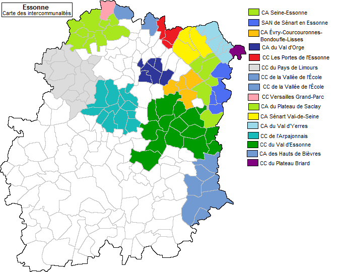 Carte des intercommunalités en Essonne en 2002.